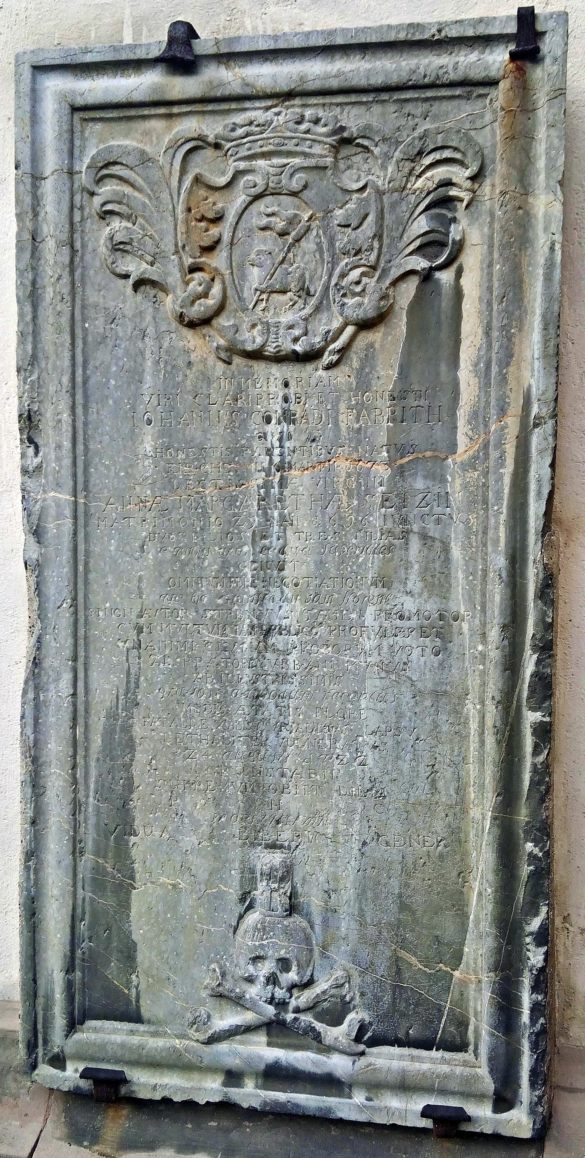 Martinskirche Grünstadt, Epitaph Schultheiß Johann Conrad Fabritius (+ 1722)